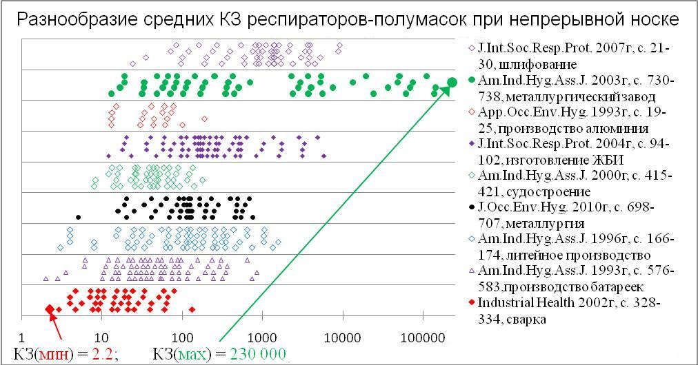 Иллюстрация к статье о испытаниях респираторов в производственных условиях. Рисунок показывает, насколько непостоянны могут быть защитные свойства респираторов схожей конструкции